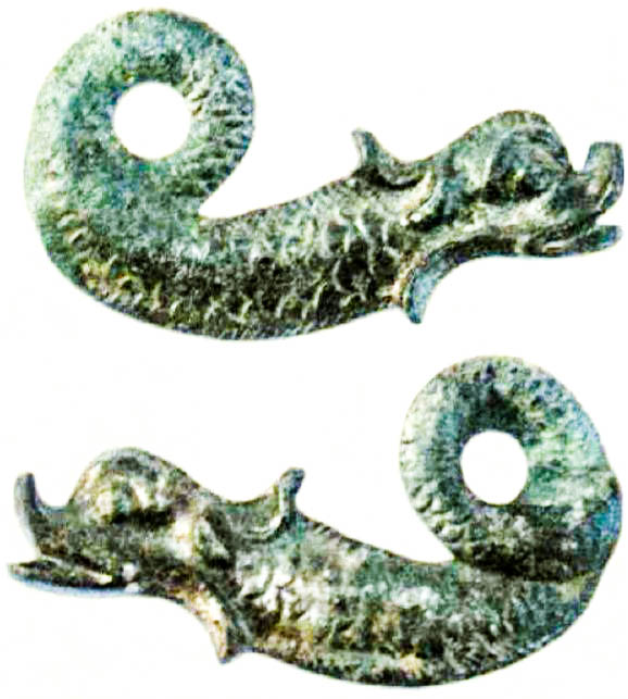 Tunc balıq fiquru, Qız qalası, tunc dövrü. Hazırda Arxeologiya və Etnoqrafiya muzeyində saxlanılır.